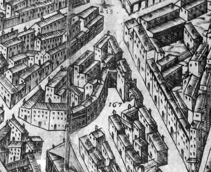 Pianta del buonsignori, dettaglio 167 palazzo de peruzzi